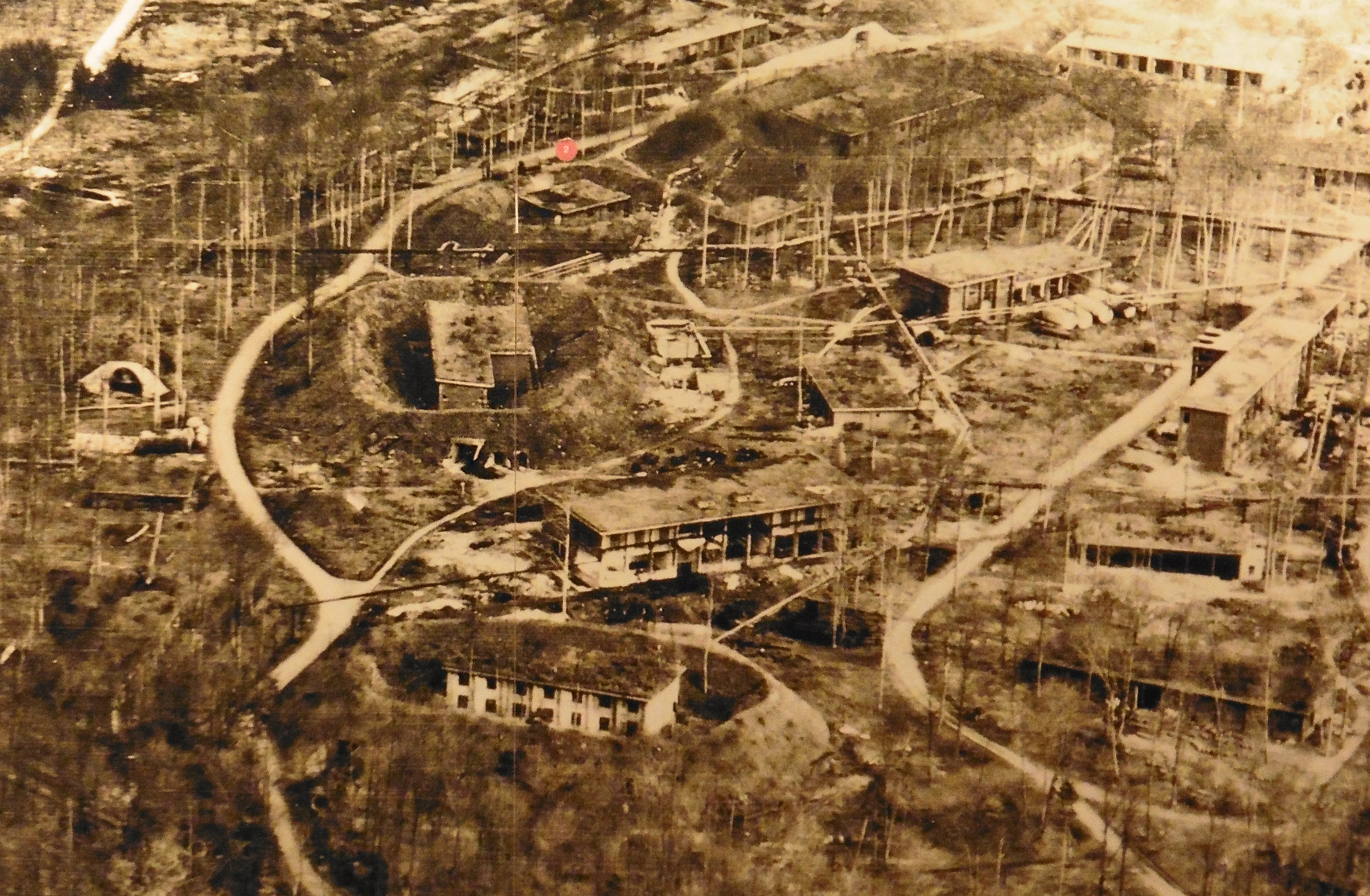 Ausschnitt aus dem Luftbild (Schrägbild) Nr. 11L des Sprengstoffwerks Allendorf (DAG) vom 16. Februar 1948 im Dokumentations- und Informationszentrum Stadtallendorf (DIZ) in Stadtallendorf. Gut erkennbar sind die hohen Erdwälle, die die einzelnen Produktionsgebäude jeweils umgeben.